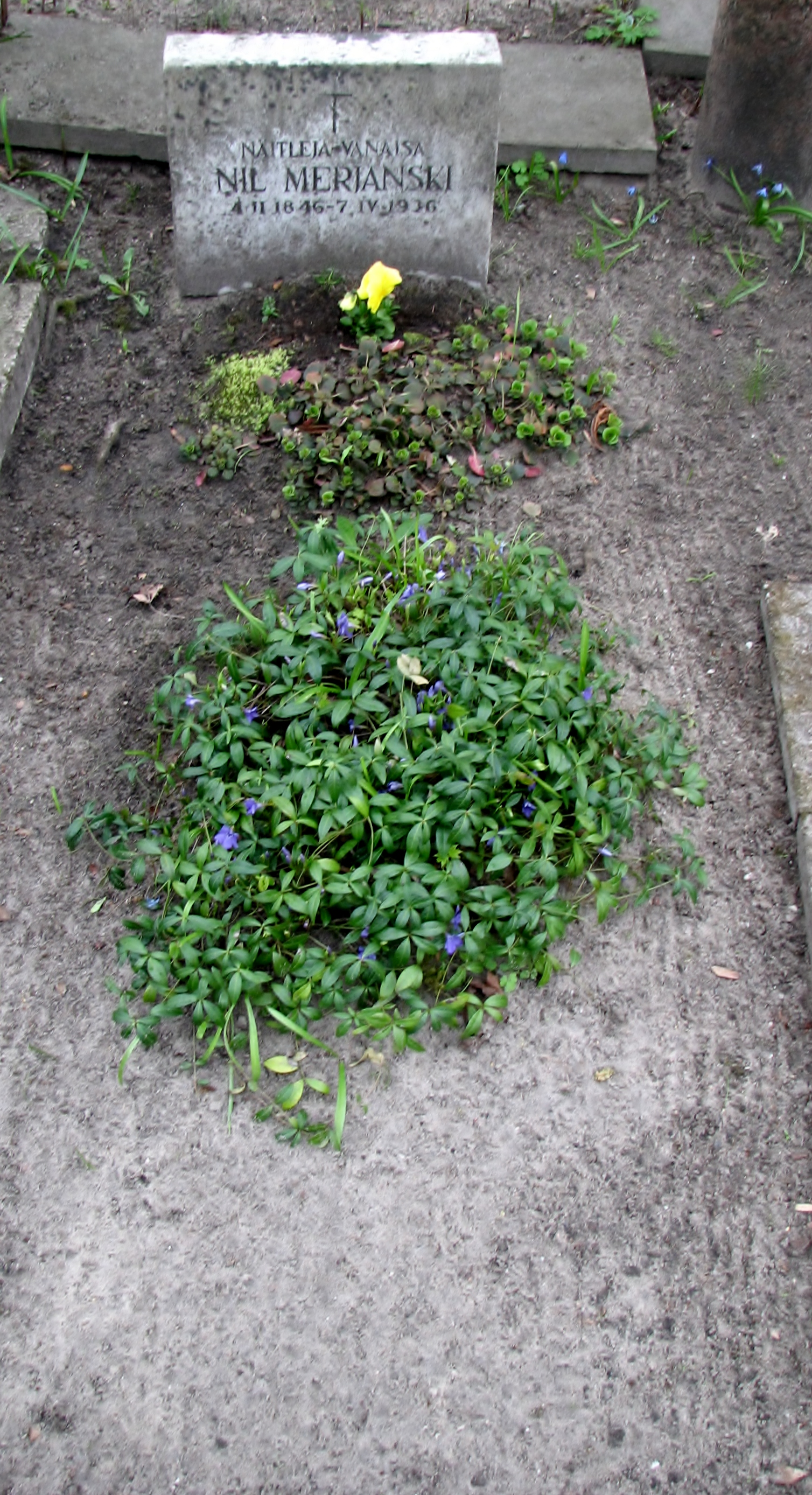 Nil Merjanski haud Siselinna kalmistul